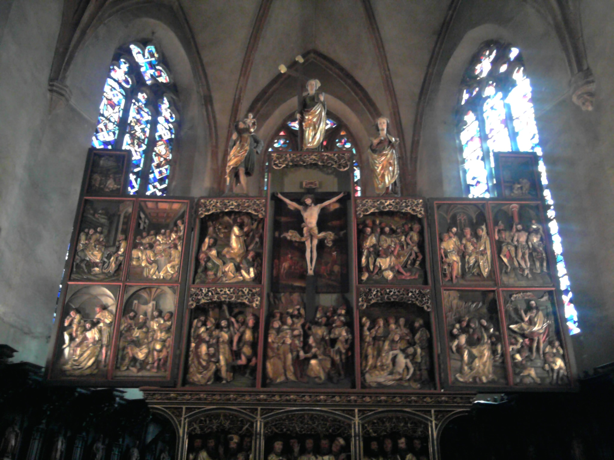 Kaysersbergi Église Sainte-Croix templom oltára (Elzász, Franciaország)